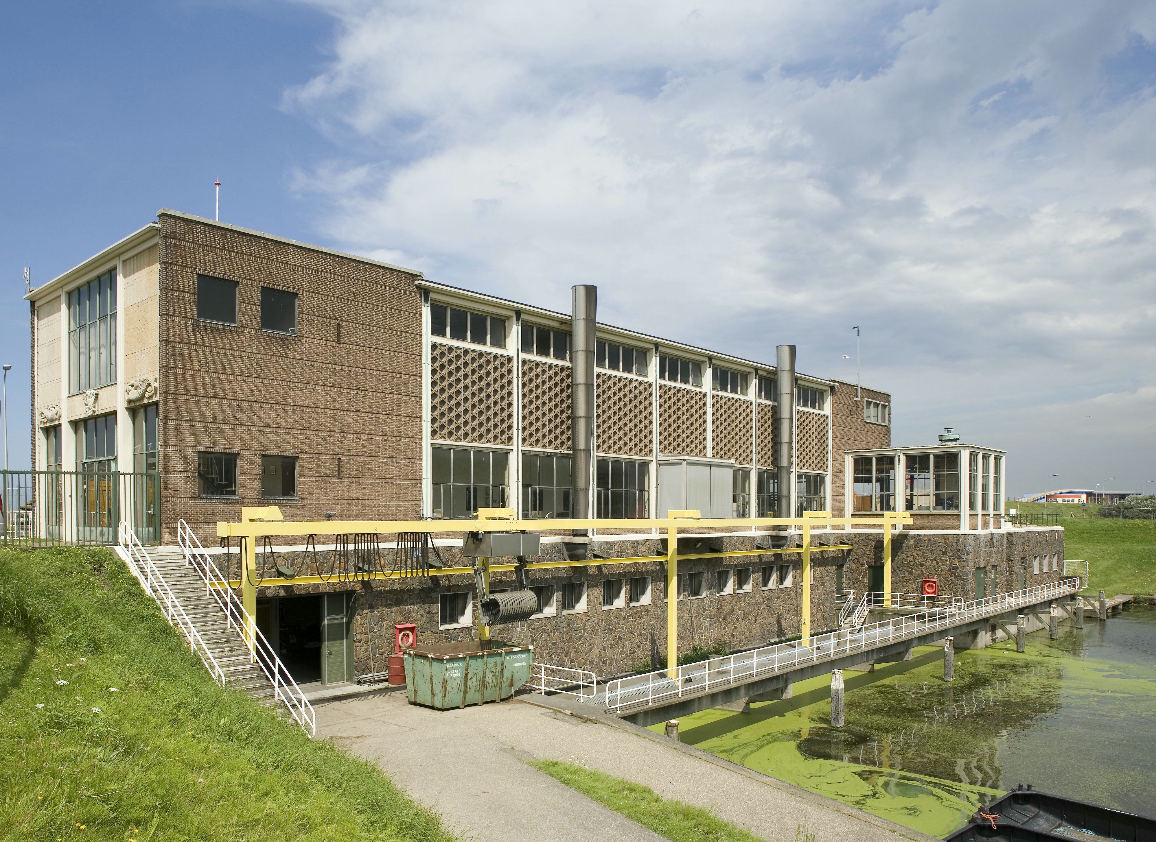 Boezemgemaal Katwijk: Overzicht van de achterzijde (opmerking: Gefotografeerd voor Monumenten van Herrezen Nederland, bladzijde 68)